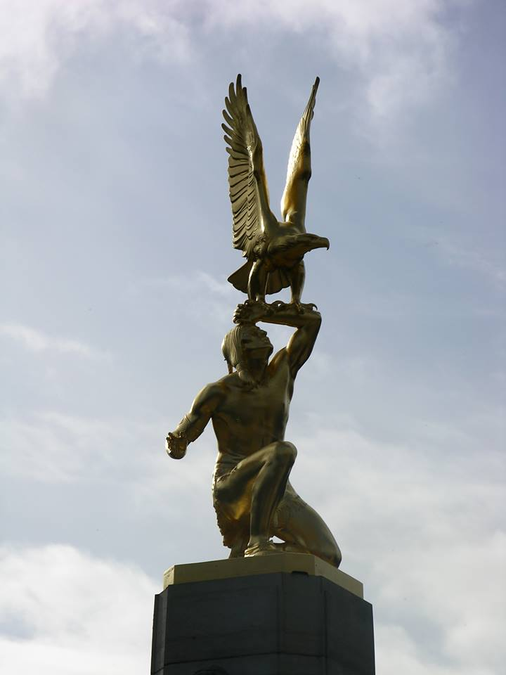 Cette statue en bronze recouverte à la feuille d'or représente un natif américain, l'aigle perché sur le bras